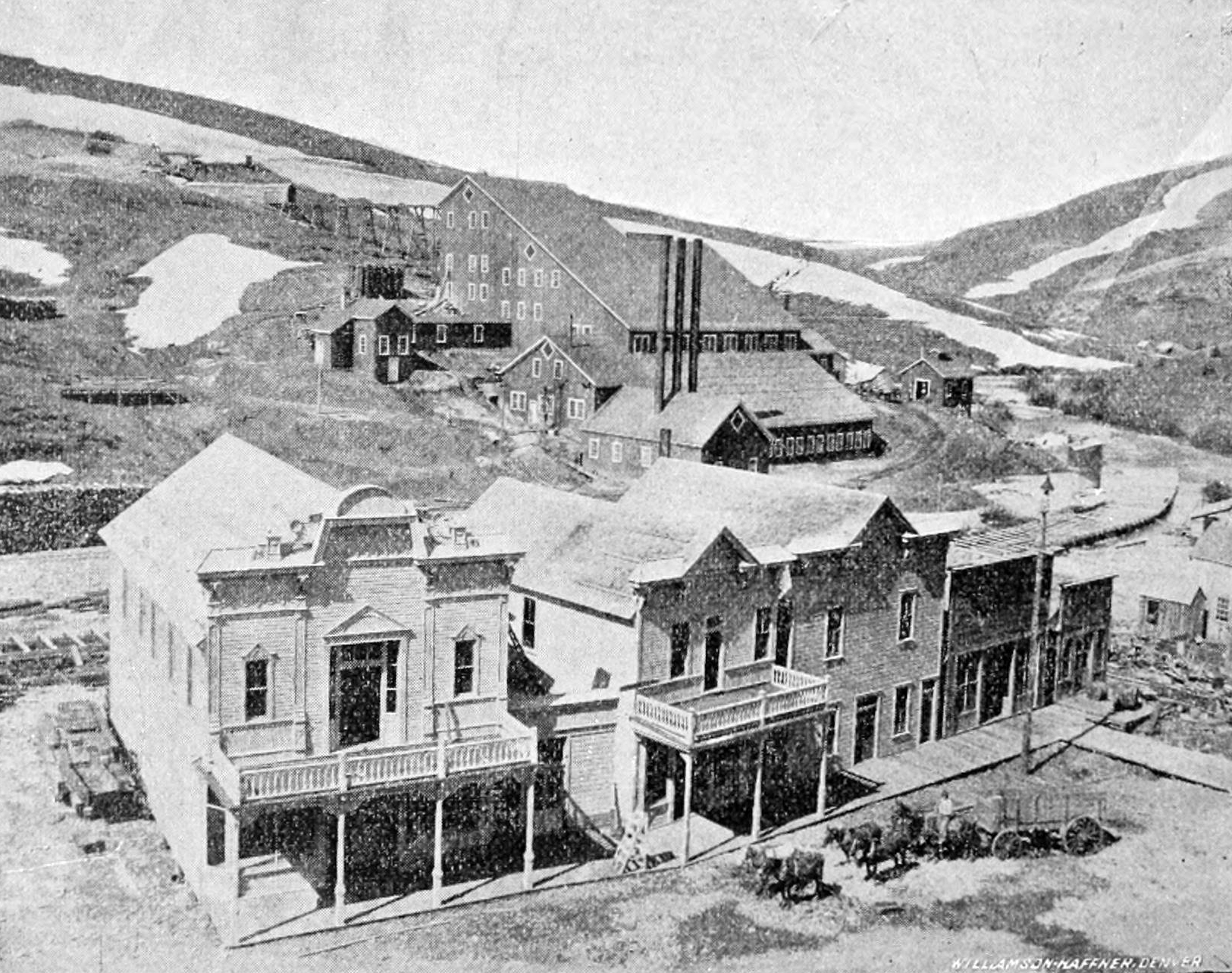 Dewey, Idaho